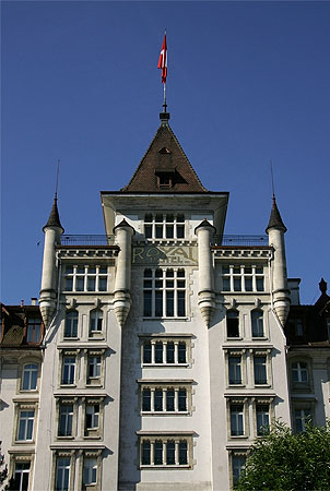 Lausanne: Hôtel Royal